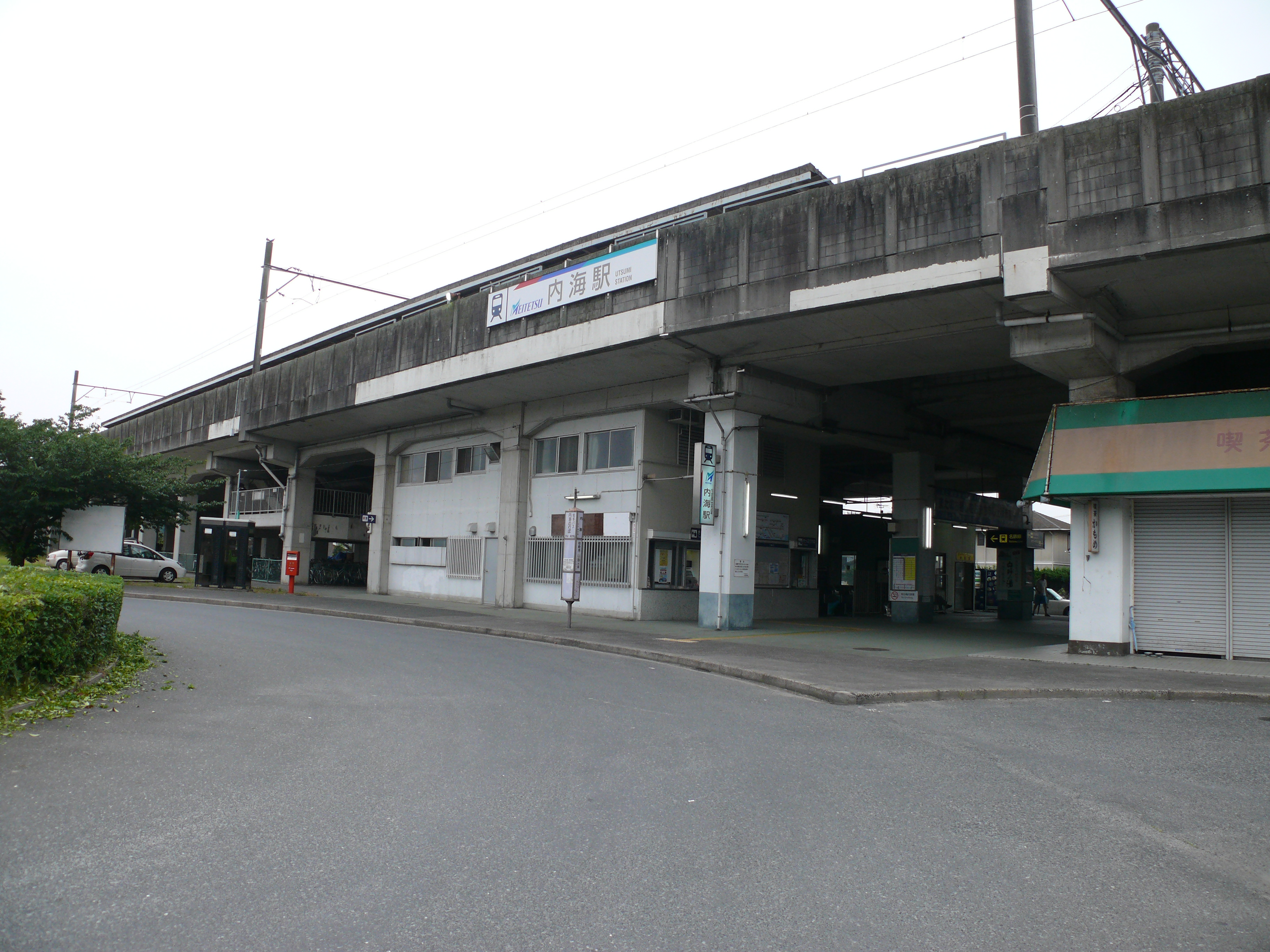 愛知県知多郡南知多町にある名古屋鉄道の内海駅